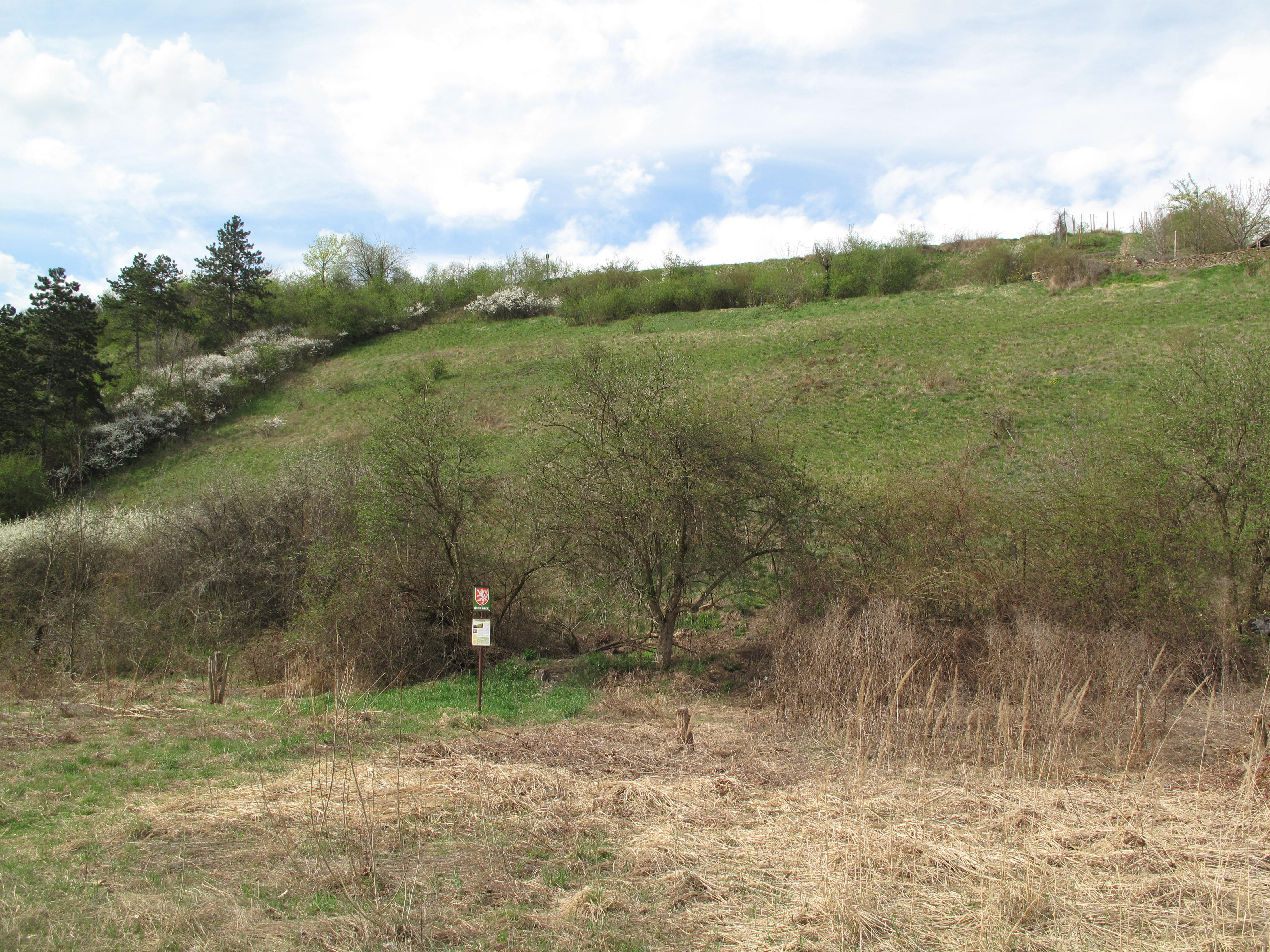 PP Trojská